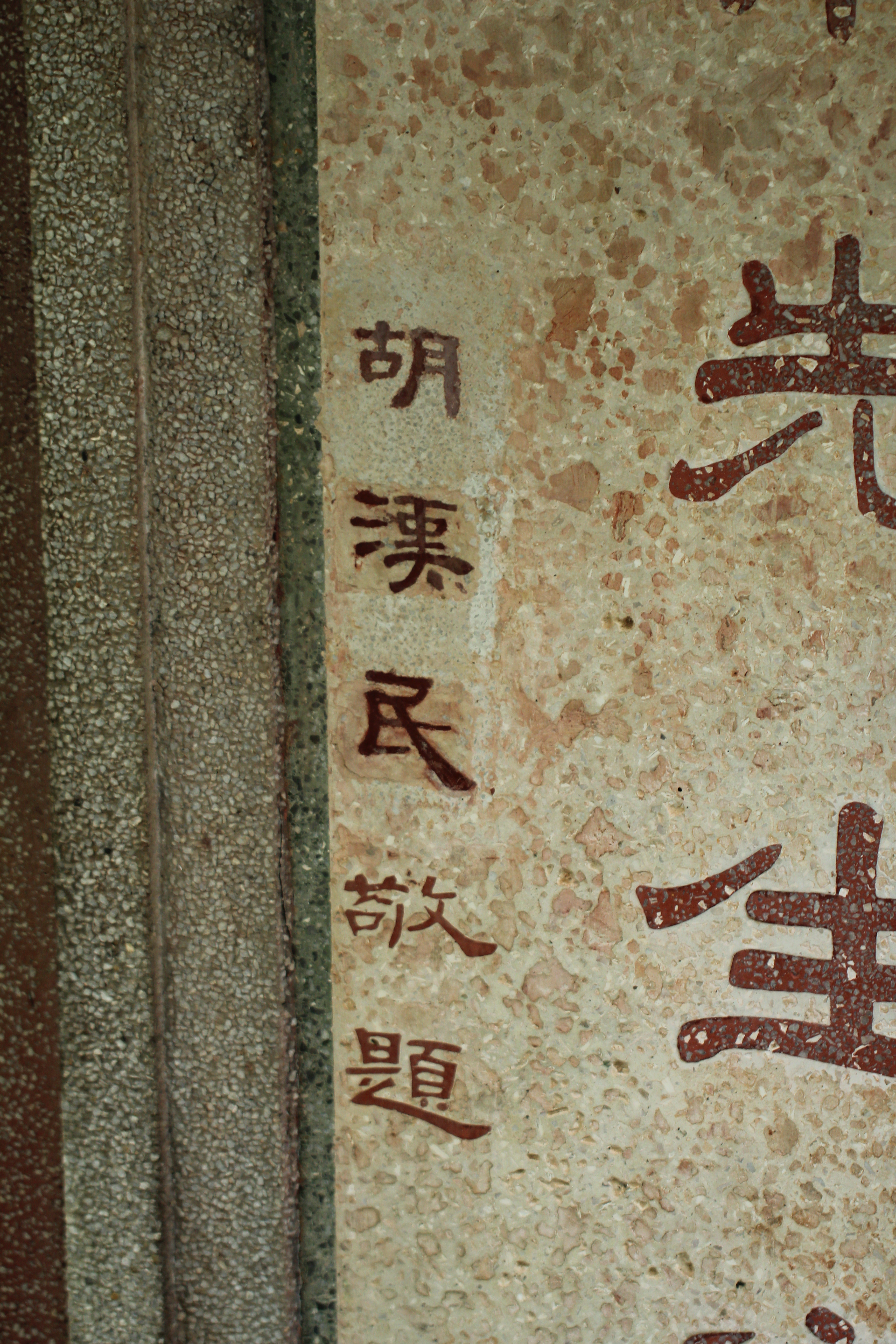 雷蔭棠先生之墓碑“胡漢民”三個字於文革期間受到破壞，後修復。